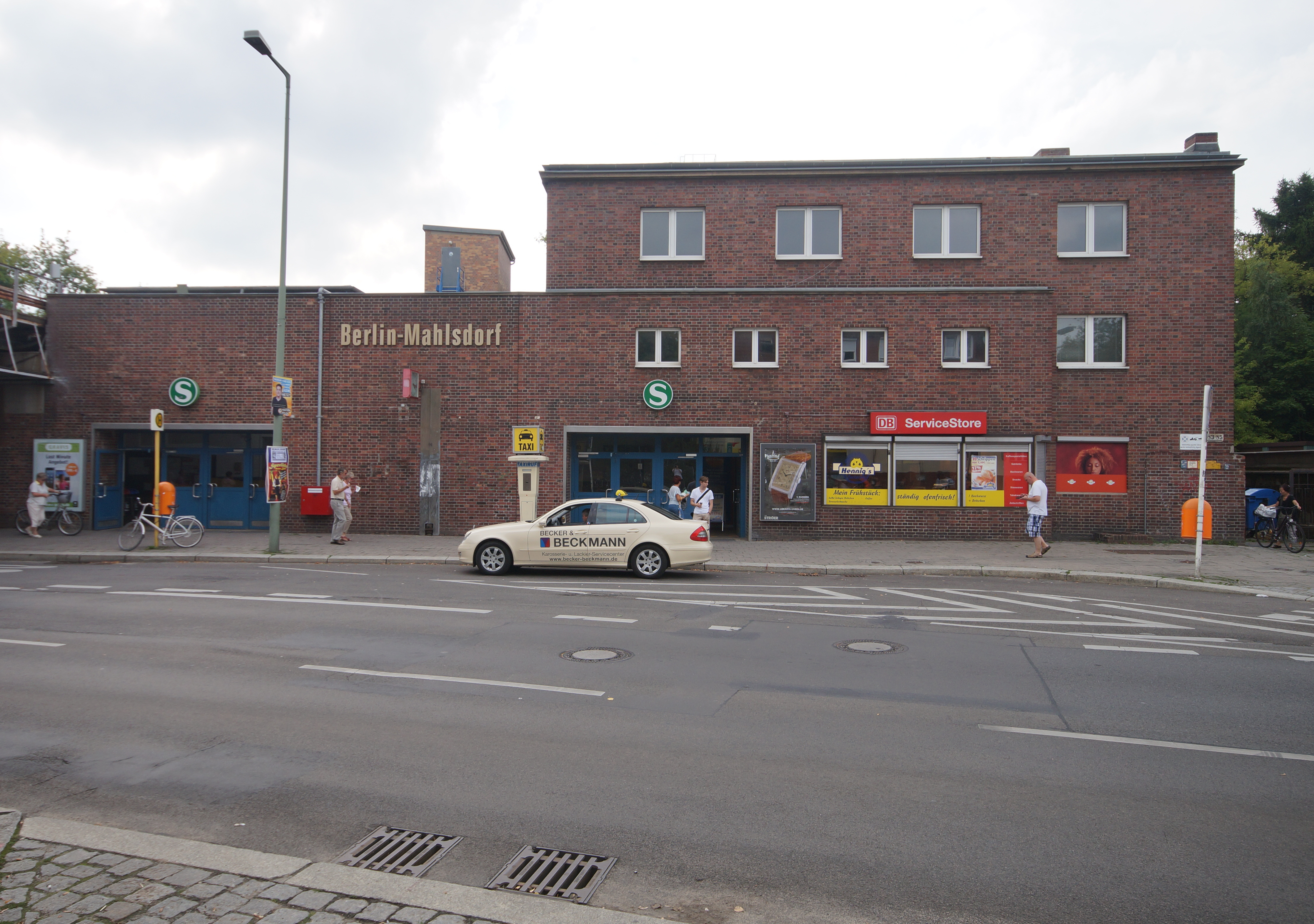 Der Haupteingang des Bahnhofsgebäudes des Bahnhofs Berlin-Mahlsdorf